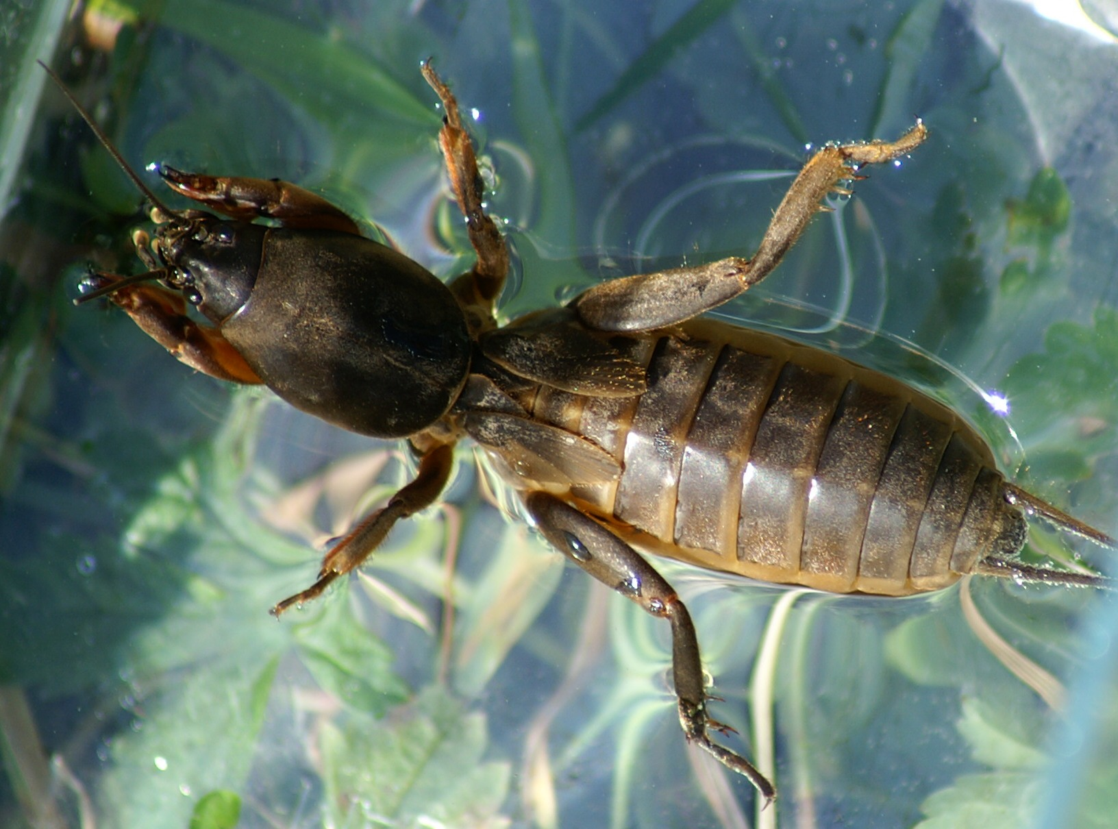 Ein Jungtier der Europäischen- oder Gemeinen Maulwurfsgrille (Gryllotalpa gryllotalpa), auch Werre genannt. Sie ist eine Langfühlerschrecke aus der Familie der Maulwurfsgrillen (Gryllotalpidae). Gefunden bei Grabarbeiten in Dornbirn. Nach der Bildherstellung wieder freigelassen.